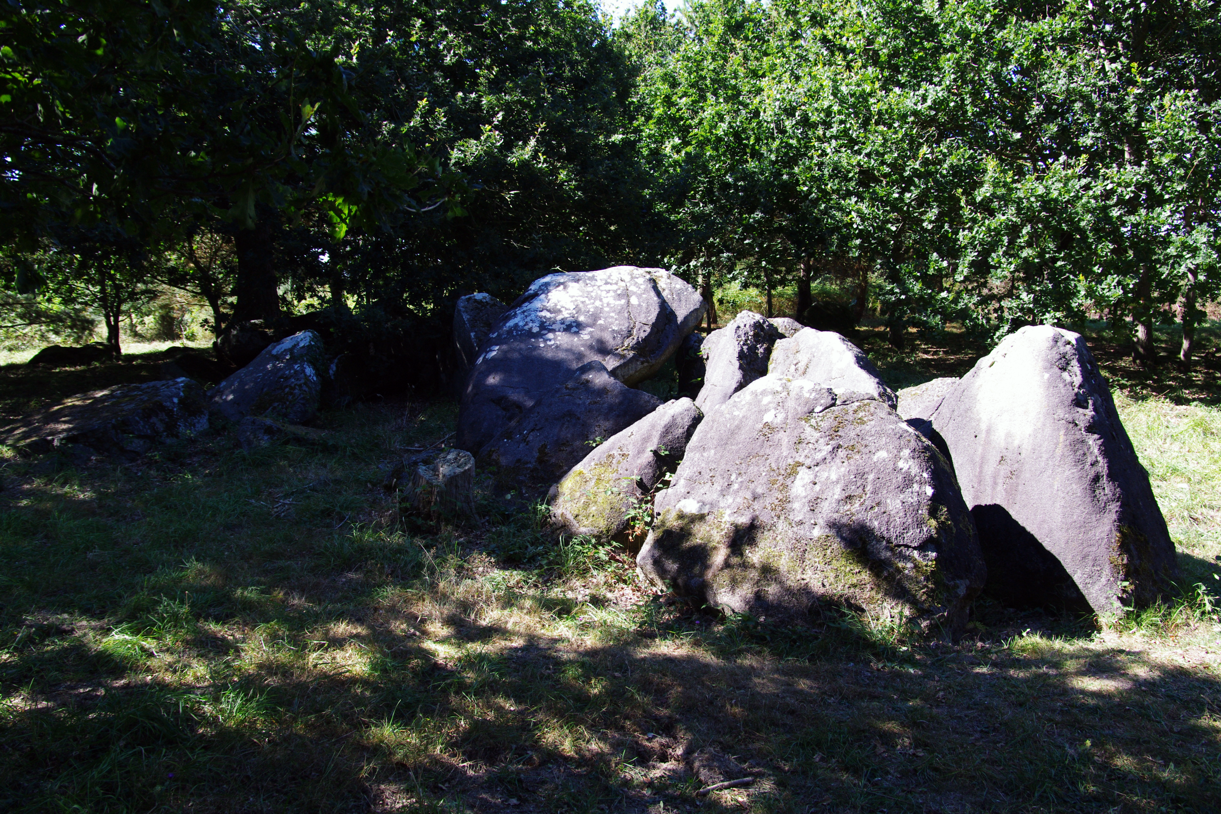 Allée couverte du Chêne-Hut, (Classement, 1963) .